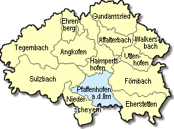 Pfaffenhofen an der Ilm und die eingemeindeten Ortsteile vor der Gebietsreform 1972